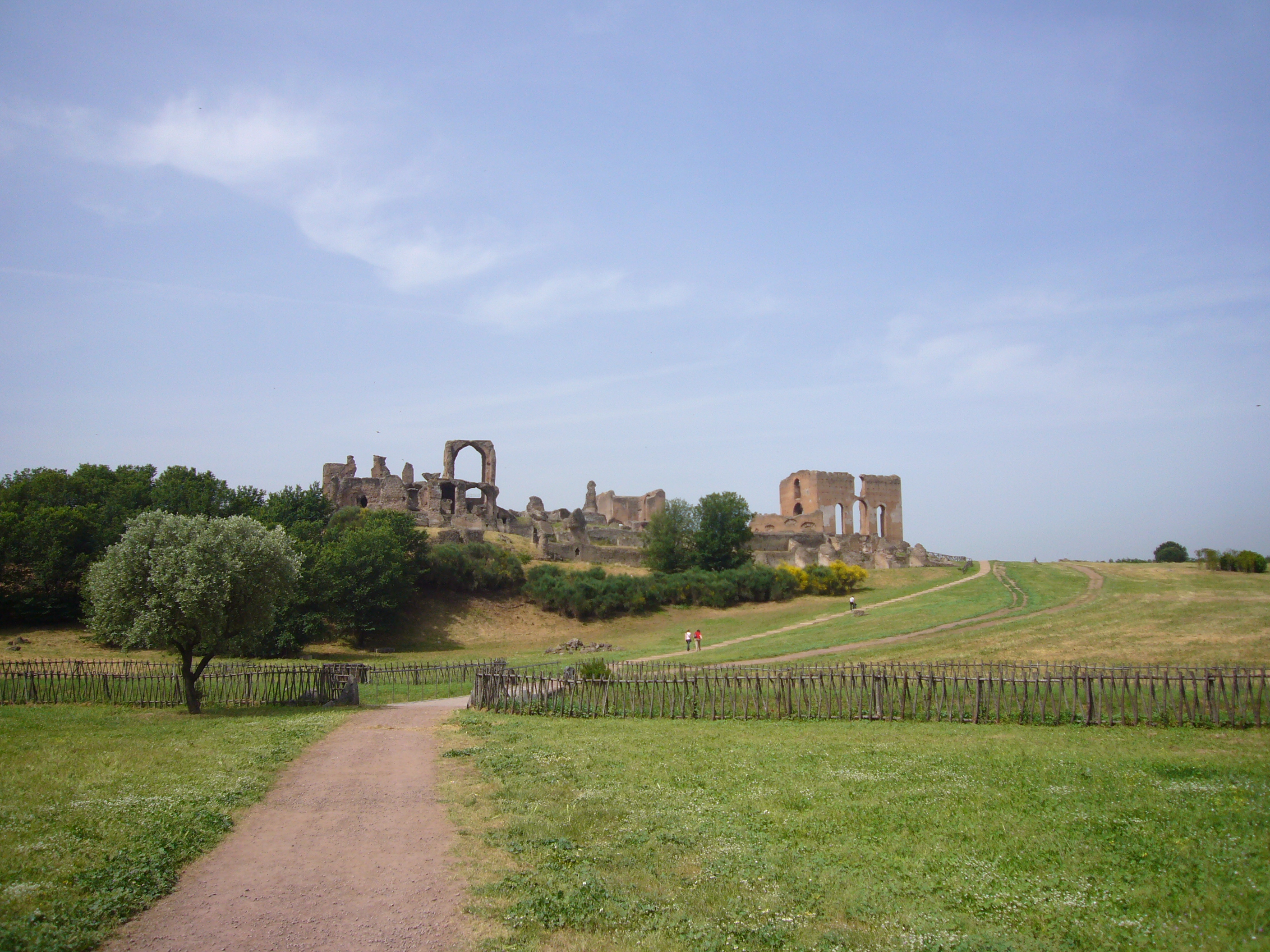 Roma, Villa dei Quintili: prospettiva dall'ingresso sull'Appia nuova